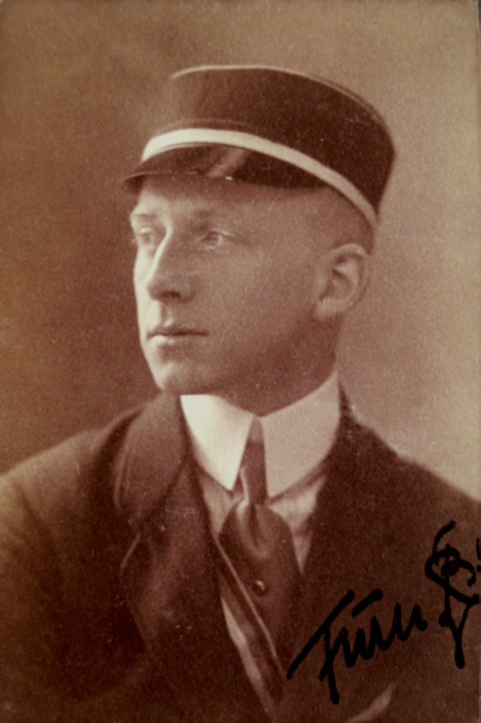 Porträtfotografie von Kurt Fürer